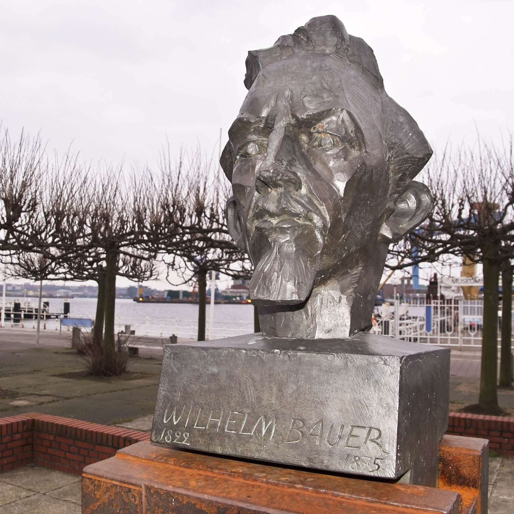 Sculpture for Wilhelm Bauer 1822-1875, German inventor, in Kiel, GermanyThis is a photograph of an architectural monument.It is on the list of cultural monuments of Kiel